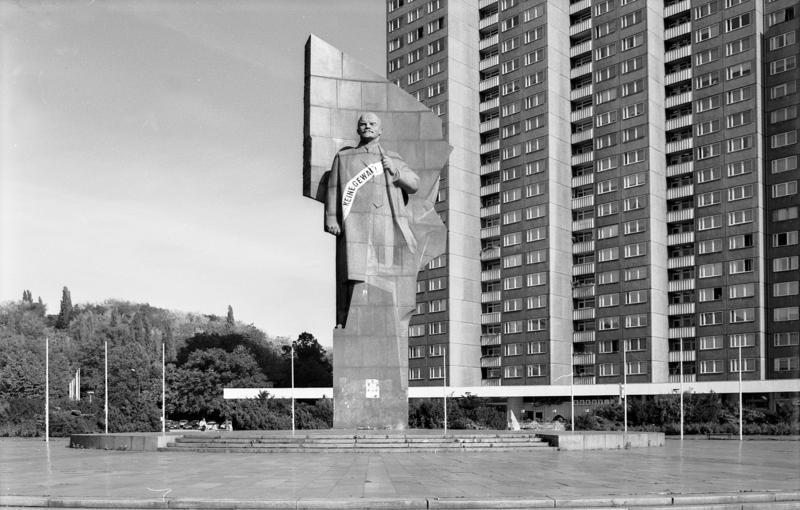 Berlin-Friedrichhain, 4.10.1991 Lenin-Denkmal am Lenin-Platz, die Aufschrift "Keine Gewalt" ist eine Aktion der Kreuzberger Künstlerinitiative "Büro für ungewöhnliche Maßnahmen"